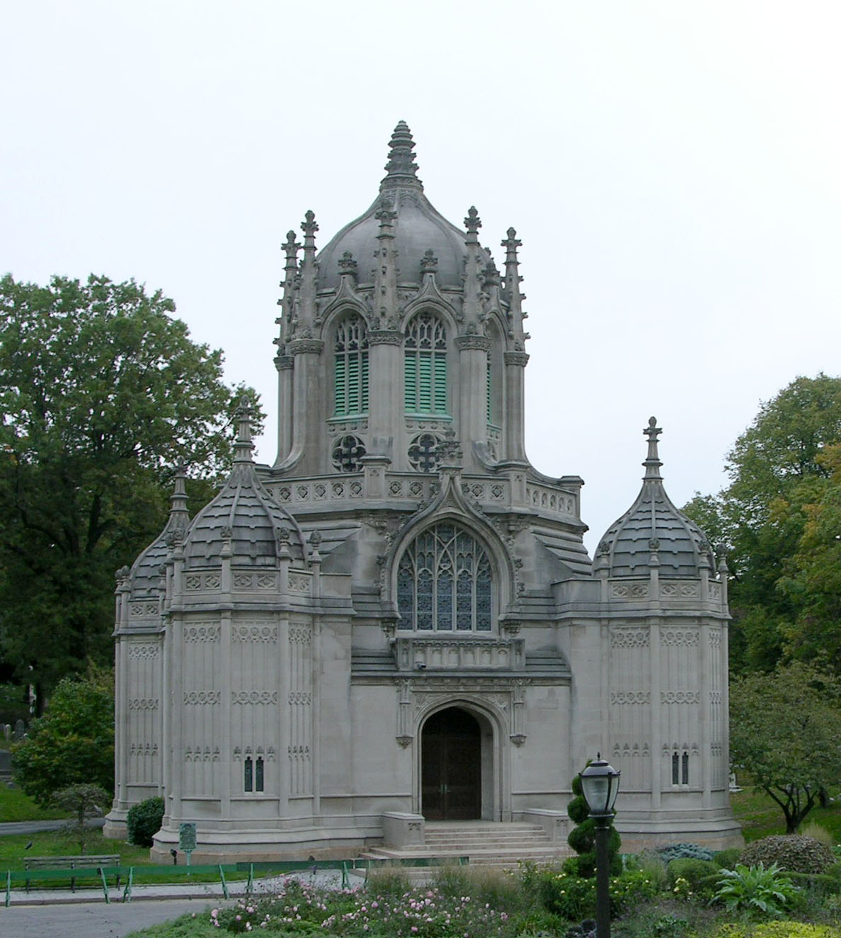 Каплиця Грін-Вудського цвинтарю. Збудована 1911 року.